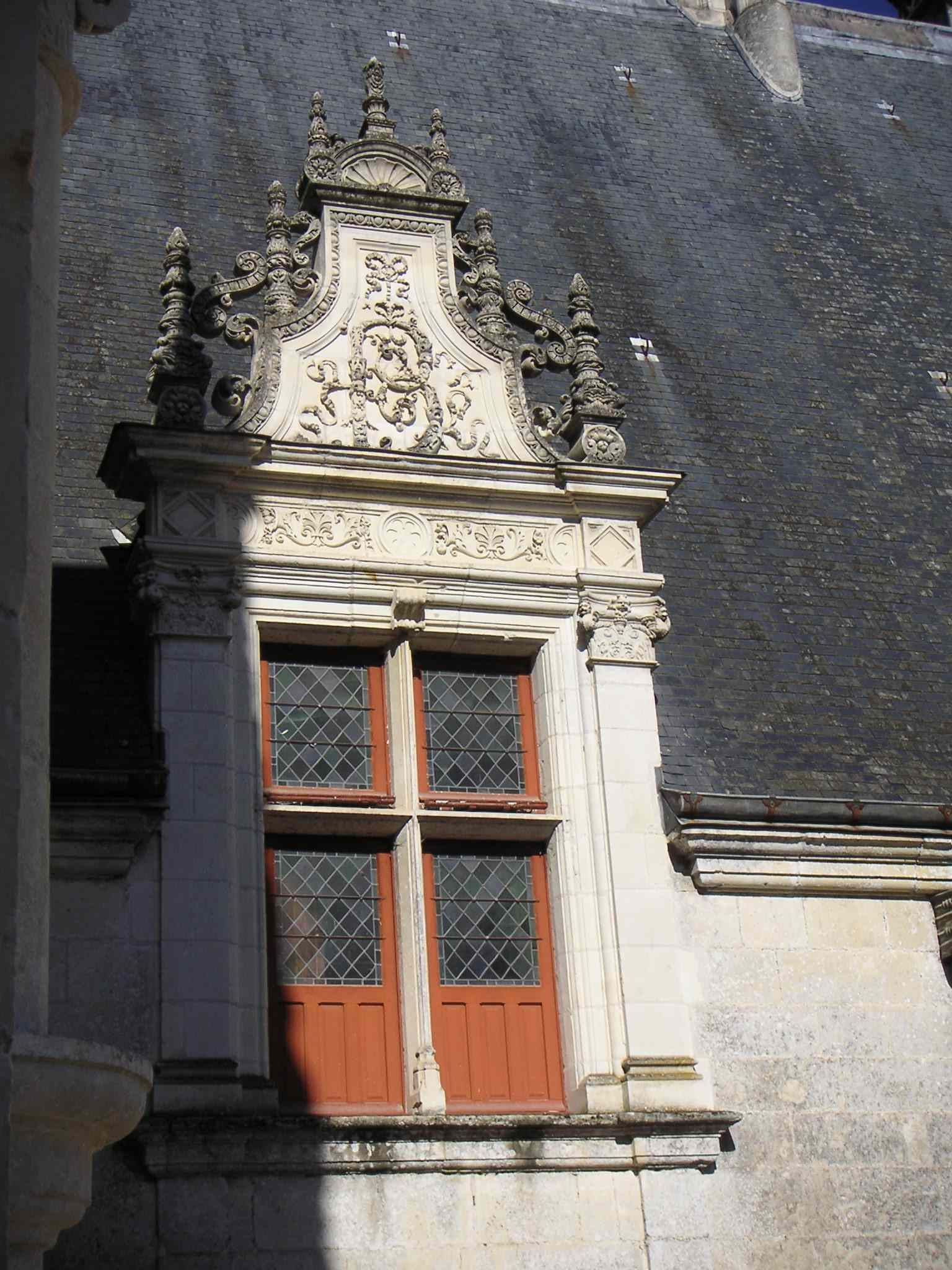 Lucarne du château d'Azay-le-rideau, initiale B, du premier propriétaire Gilles Berthelot.